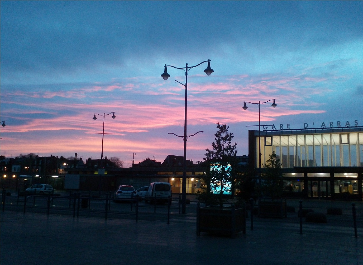 Gare d'Arras